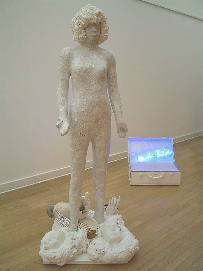 Rengha Rodewill: "Hommage à Mascha Kaléko" zum 100. Geburtstag der Dichterin. Ausstellung: Georg Kolbe Museum Berlin, 27.09.2007. Das Werk von Rengha Rodewill ist eine Installation aus zwei Teilen. Zum einen ein alter Koffer in dem das verkohlte Buch von Maschas Kalékos lyrischem Stenogrammheft liegt. Zum anderen eine Figurine, die über und über mit fast 2600 Texten beklebt ist und auf einer quadratischen Plinte steht. In deren weichen Grund versinkt nicht nur die Figur bis zu den Knöcheln, in ihrem wolkigen Grund liegen wesentliche Wegmarken von Mascha Kalékos Leben... (Quelle: Kunsthistorikerin Regine Reinhardt)